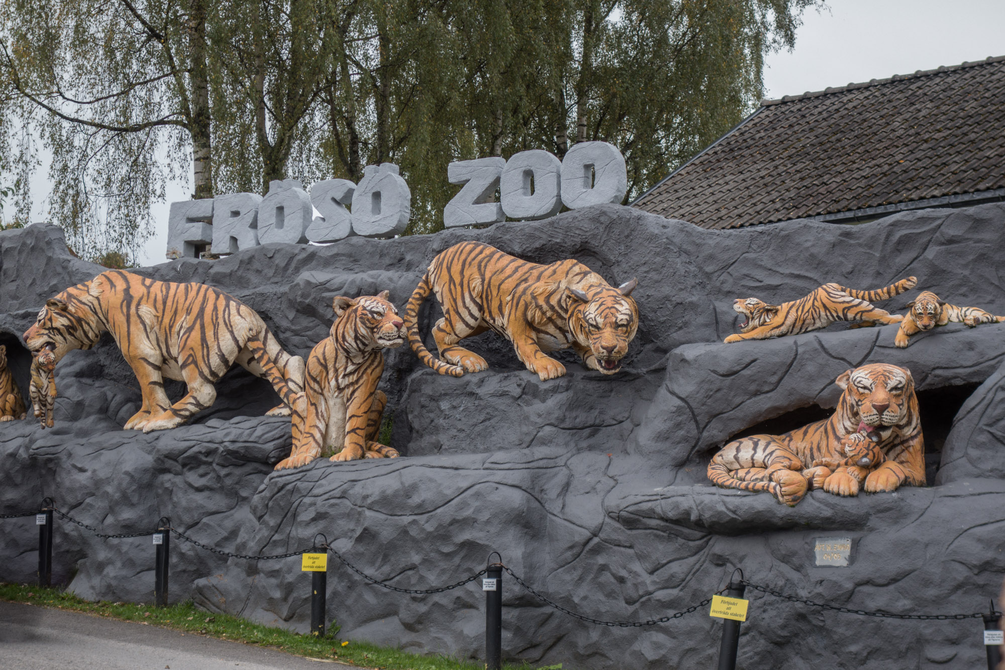 Frösö Zoo